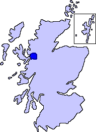 Историческая область Кинтайл, ШотландияПримерные границы исторической области Кинтайл, Шотландия